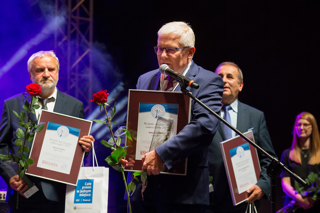 Adam Neumann, zastępca prezydenta Gliwic 2006-2019 podczas odbioru nagrody za 2. miejsce rankingu Liderzy Inwestycji 2016–2018 Pisma Terytorialnego Wspólnota